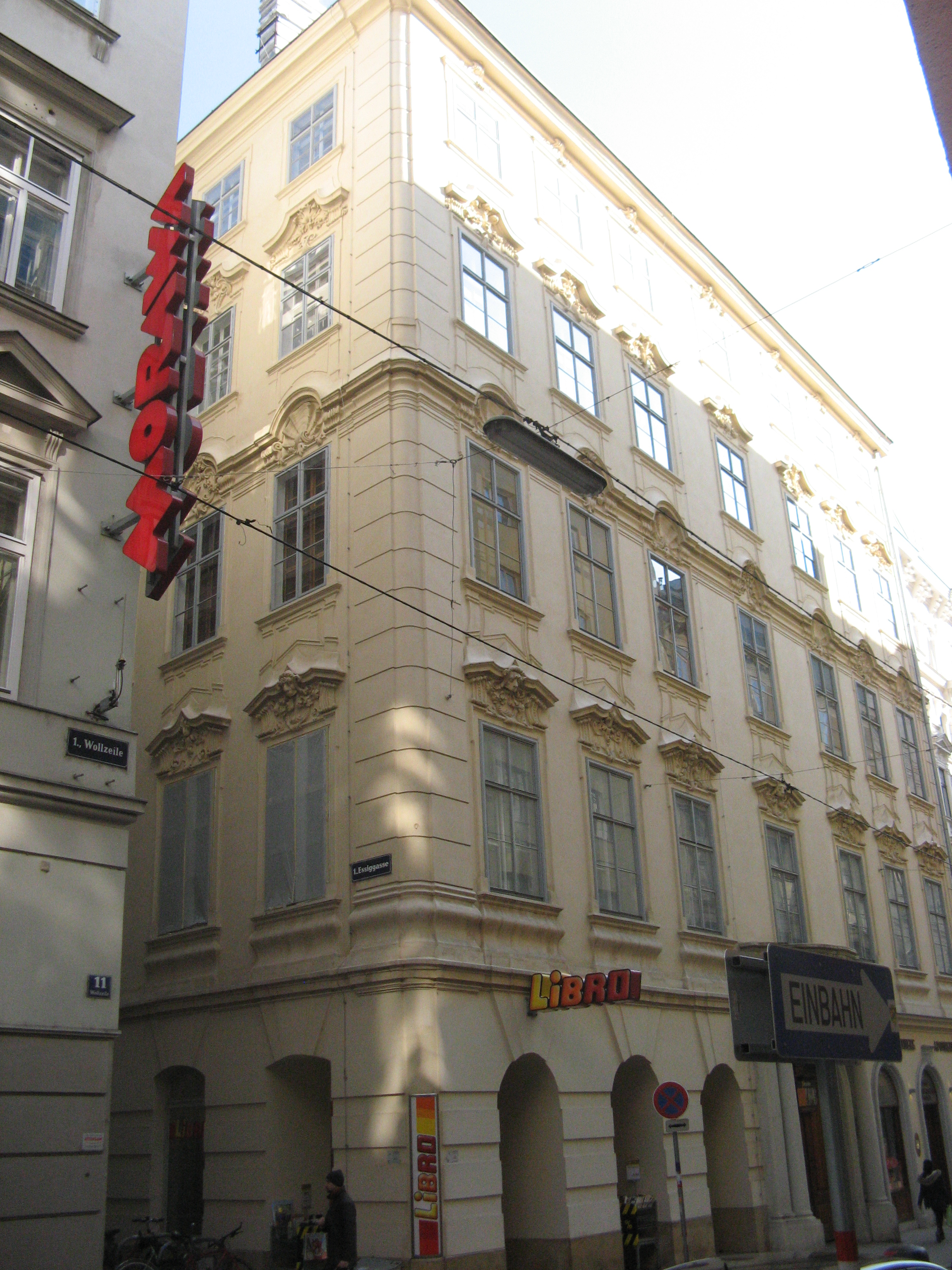 Wollzeile 13, Wien-Innere Stadt